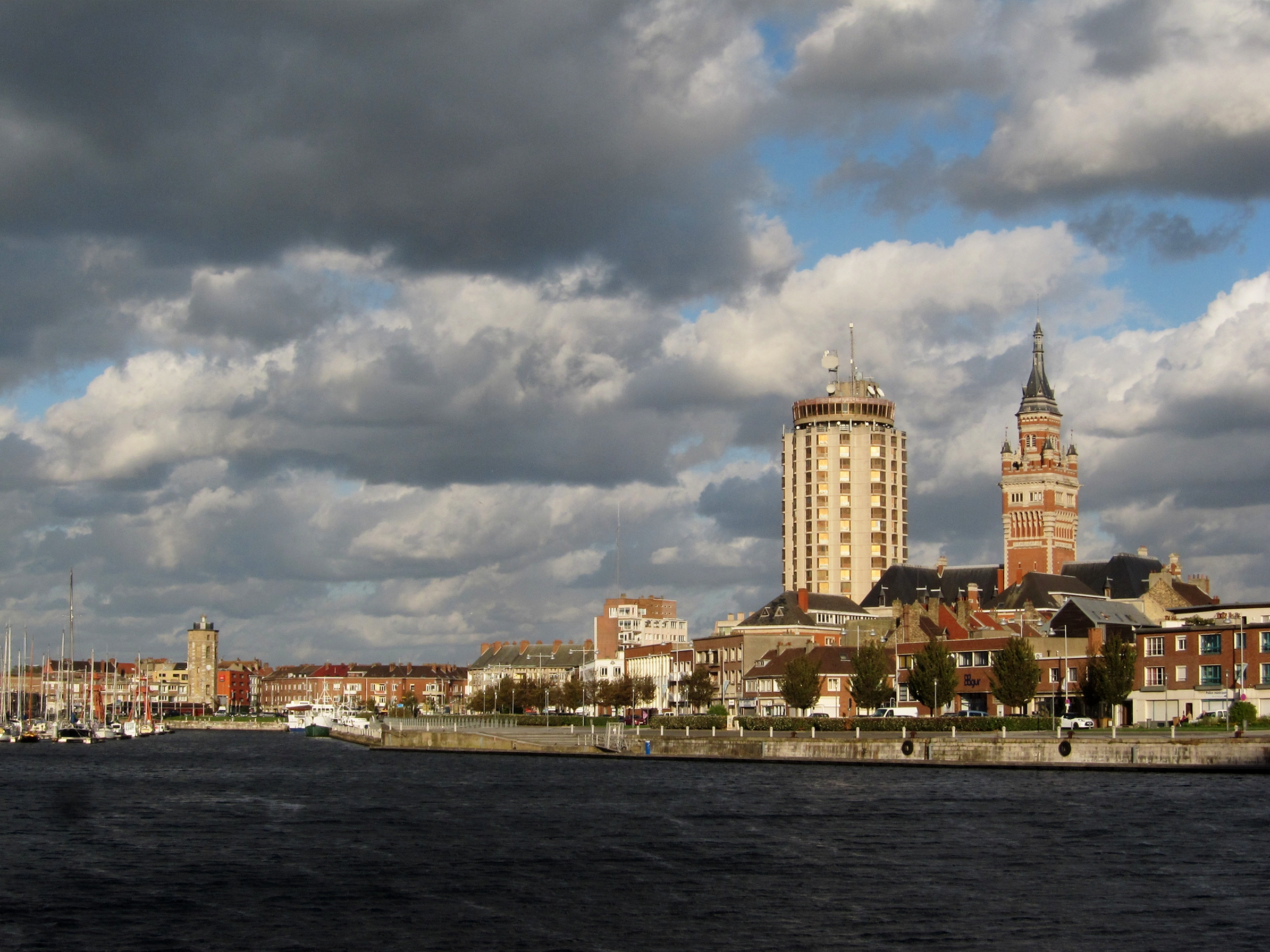 La rade du port de Dunkerque.